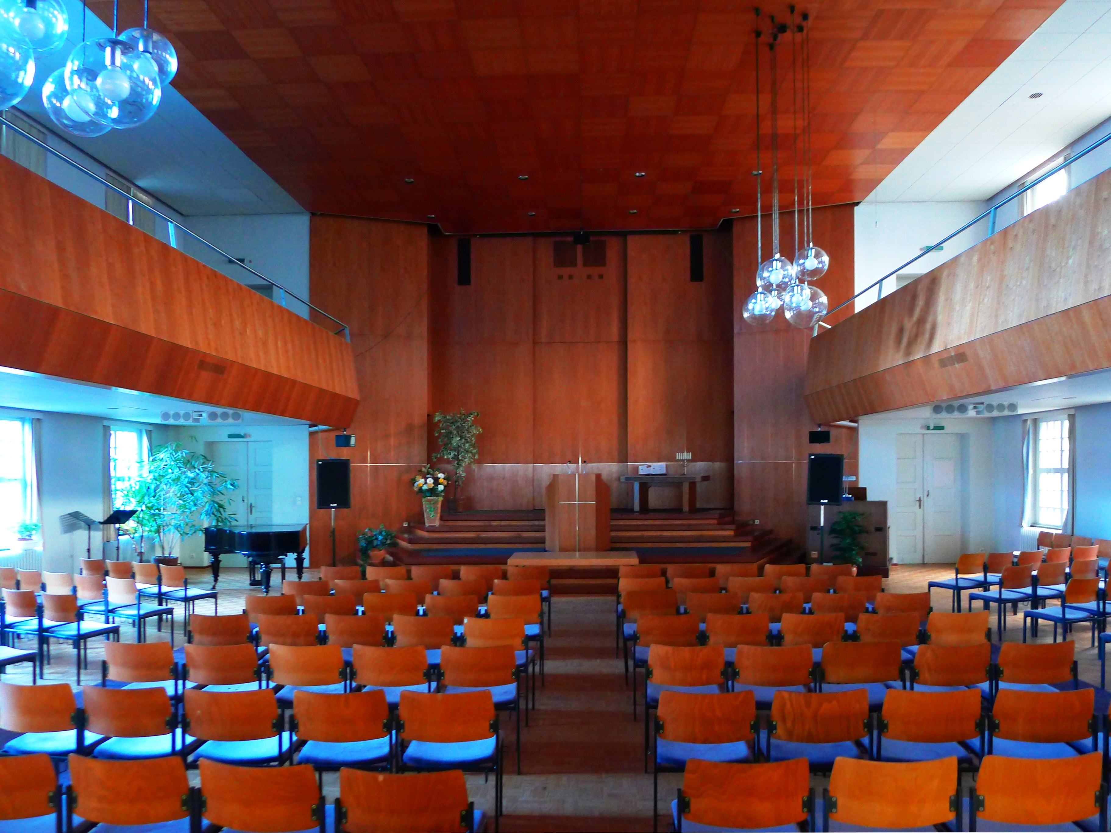 Blick in Richtung Altar